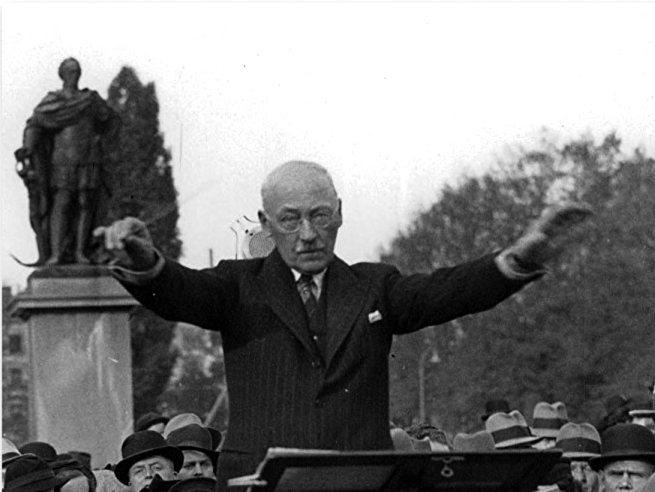 Hugo Alfvén dirigerar Svenska musikerförbundets orkester i Kungsträdgården, Stockholm, den 18 oktober 1937